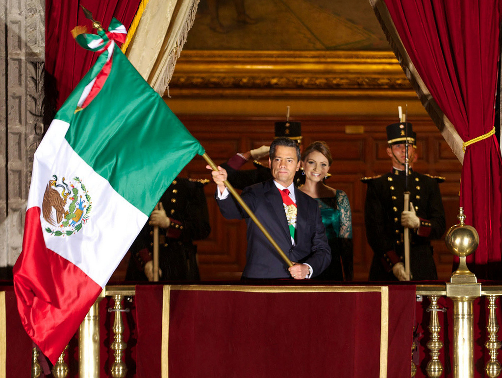 Ceremonia del Grito de Independencia. México, D.F. 15 de septiembre de 2013.